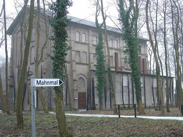 Das Bild zeigt den Augustaschacht Ohrbeck an der Stadtgrenze Georgsmarienhütte / Hasbergen im Landkreis Osnabrück.